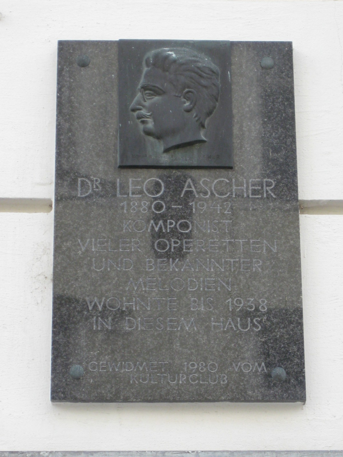 Leo Ascher-Gedenktafel, Kurzbauergasse 6, Wien Leopoldstadt.